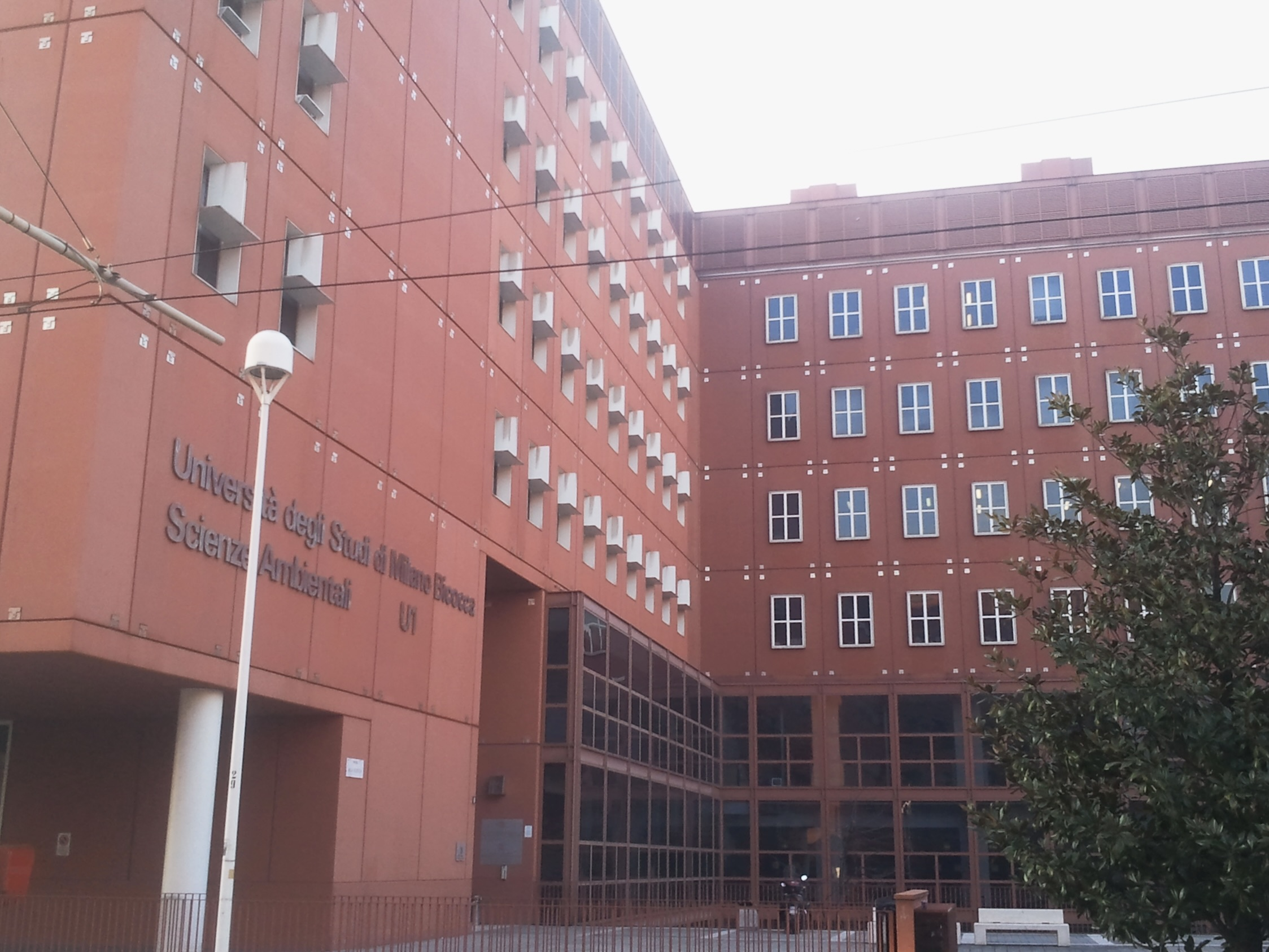 Edificio U1 dell'università Milano-Bicocca visto da piazza della Scienza, Milano.